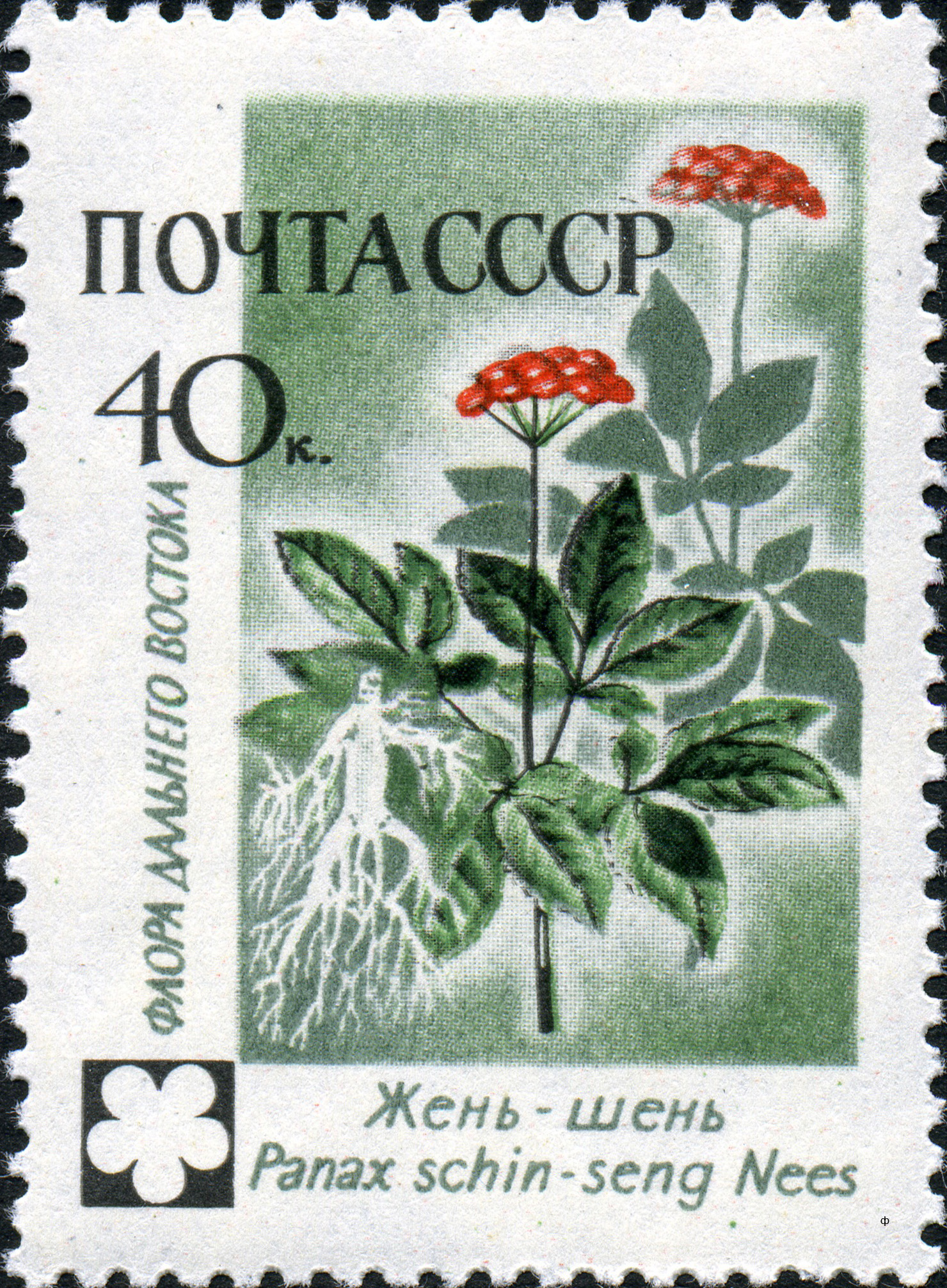 Марка СССР